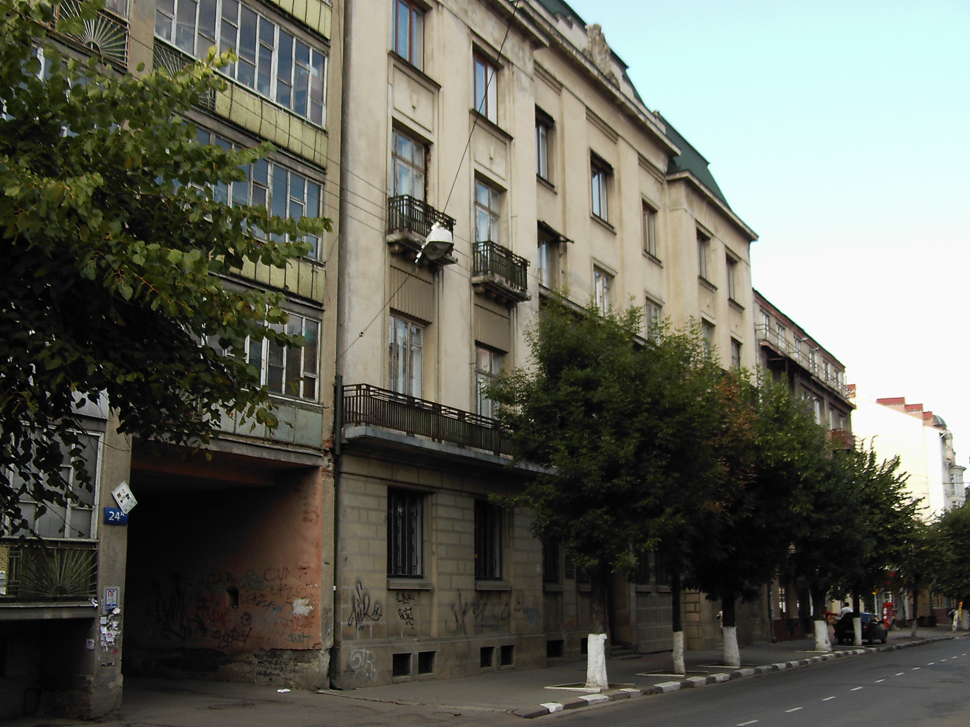 Управління Культури Івано-Франківської Обласної Державної Адміністрації. ОбласнаУніверсальна Наукова Бібліотека. м. Івано-Франківськ-2